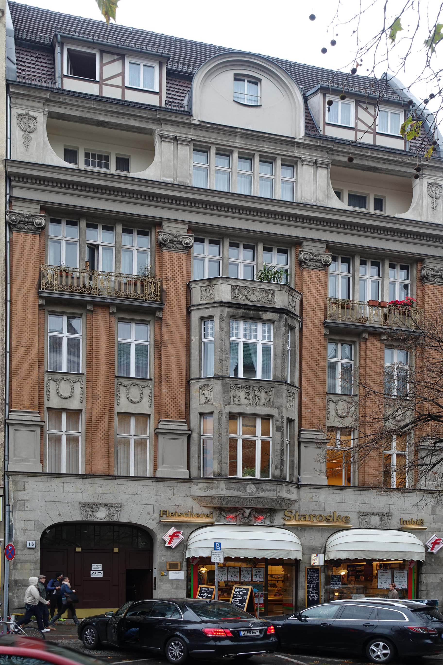 Mietshaus